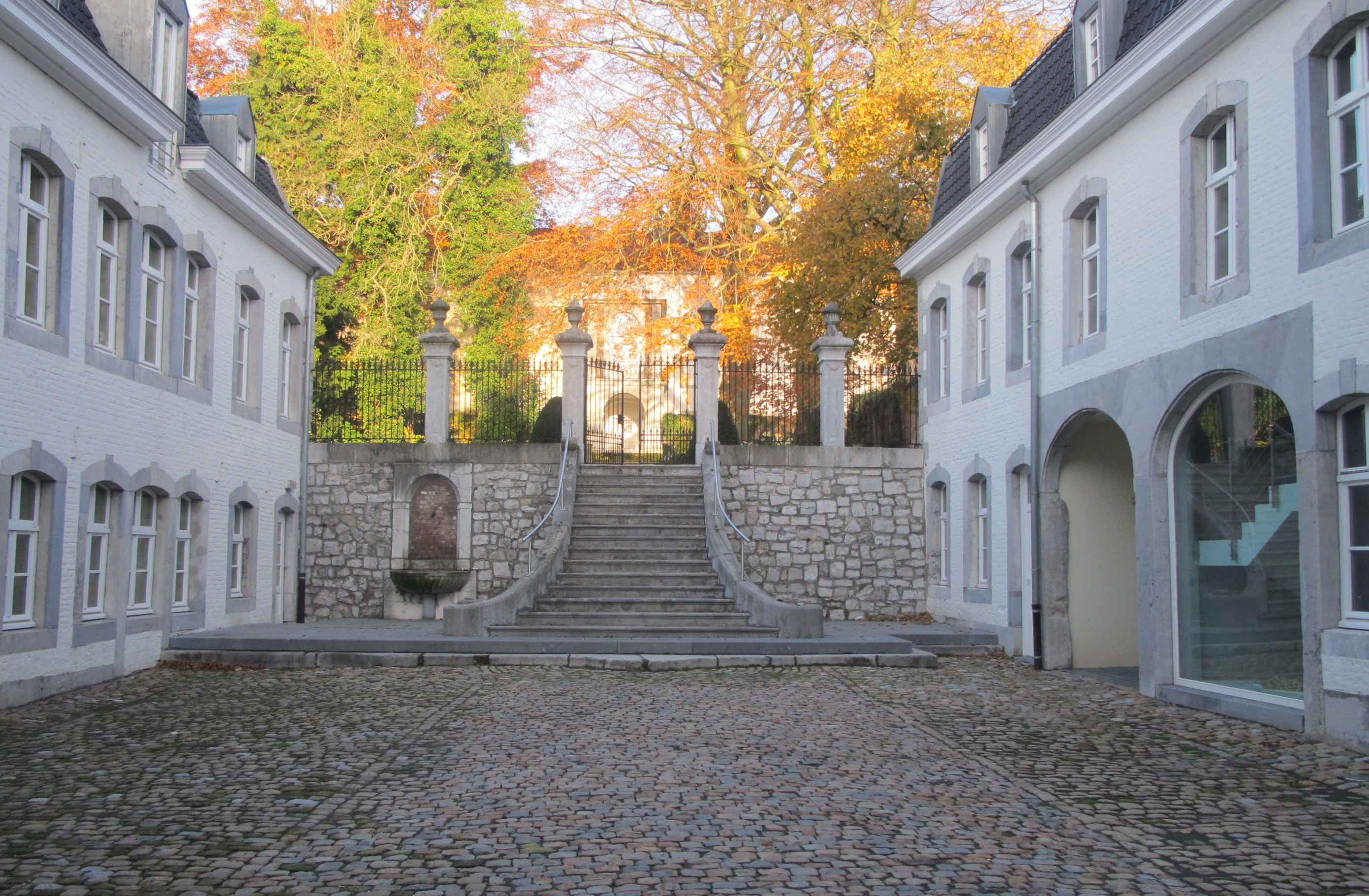 Innenhof und Gartentreppe Haus de Grand Ry - The Losen, im Hintergrund das Fabrikationsgebäude, Gospert 40-42 Eupen, Belgien